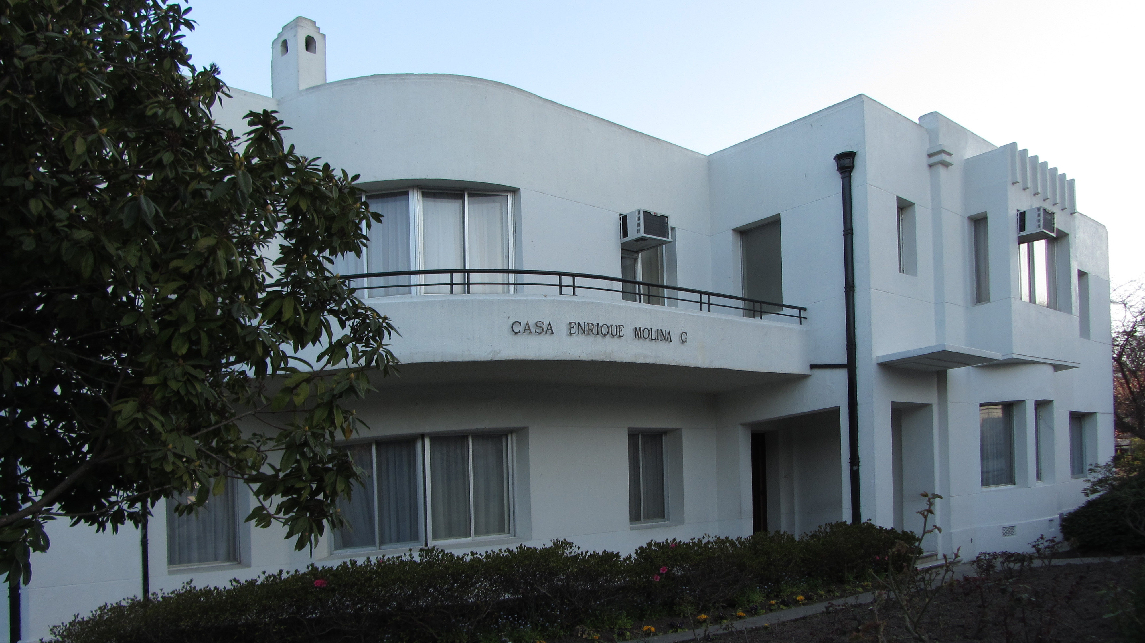 Rectoría de la Universidad de Concepción Antigua casa de Enrique Molina Garmendia, fundador de la Universidad Concepción, Chile Septiembre de 2012